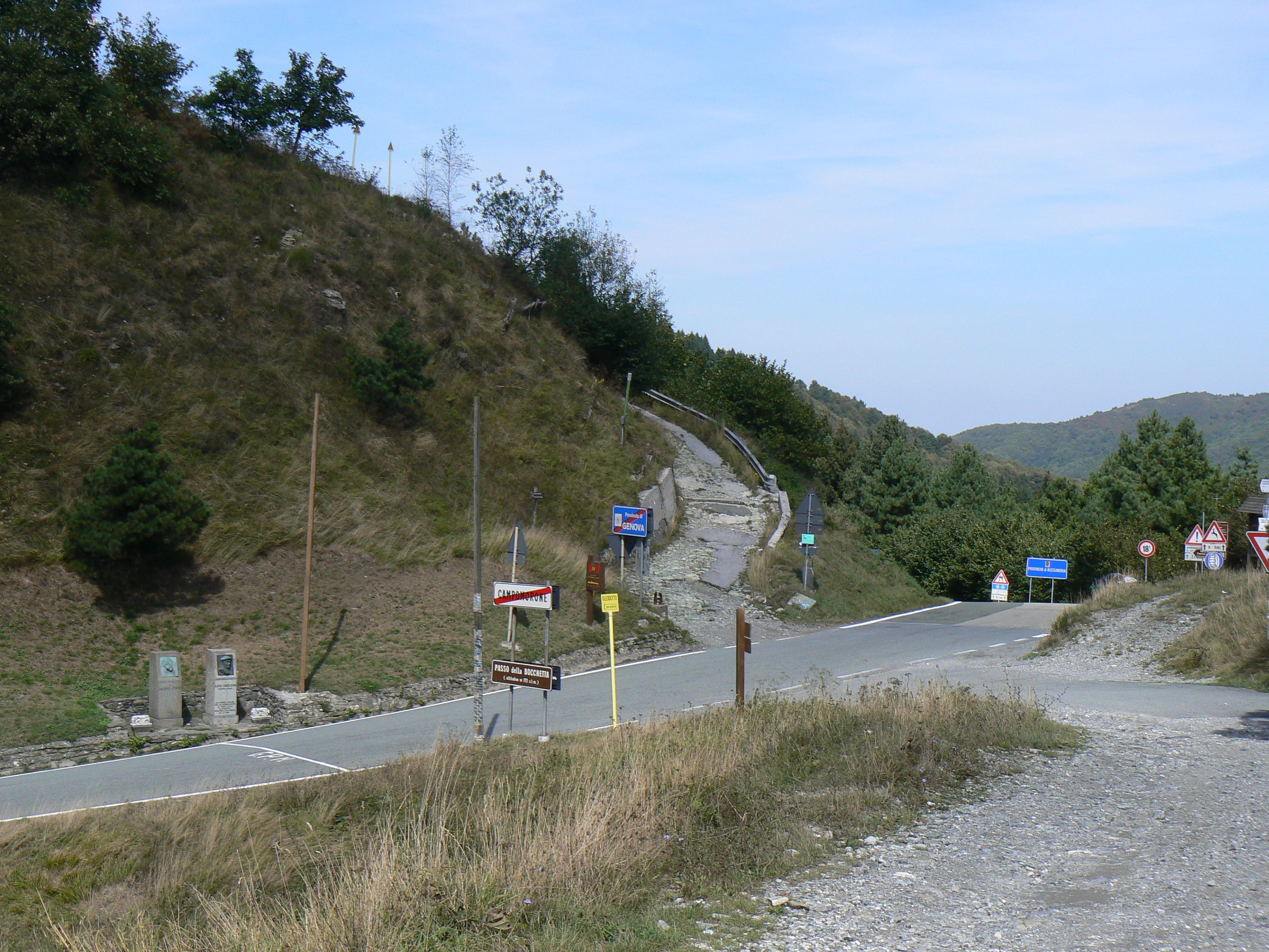 La zona del passo della Bocchetta